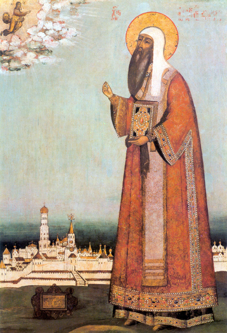 Иконописец Георгий Зиновьев. Митрополит Алексий у Московского Кремля. Около 1690-х гг. Дерево, яичная темпера. 172×107. Государственная Третьяковская галерея